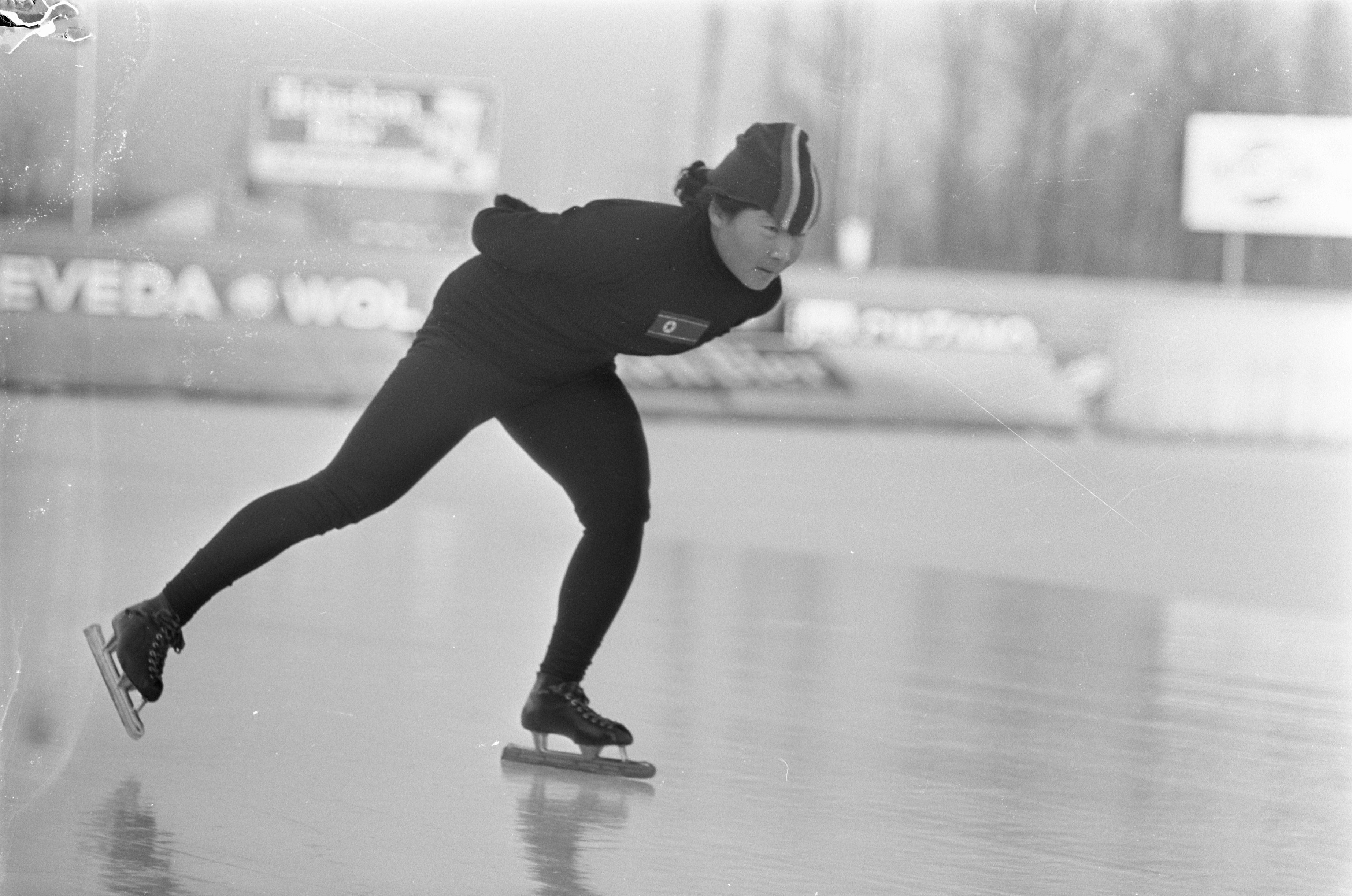 Collectie / Archief : Fotocollectie Anefo Reportage / Serie : [ onbekend ] Beschrijving : Wereldkampioenschappen schaatsen all-round voor dames te Deventer. Noord-Koreaanse schaatsster [Kim Song-Sun?] Datum : 15 februari 1967 Locatie : Noord-Korea Trefwoorden : schaatsen, sport Persoonsnaam : Kim Song-Sun Fotograaf : Nijs, Jac. de / Anefo Auteursrechthebbende : Nationaal Archief Materiaalsoort : Negatief (zwart/wit) Nummer archiefinventaris : bekijk toegang 2.24.01.05 Bestanddeelnummer : 920-0820